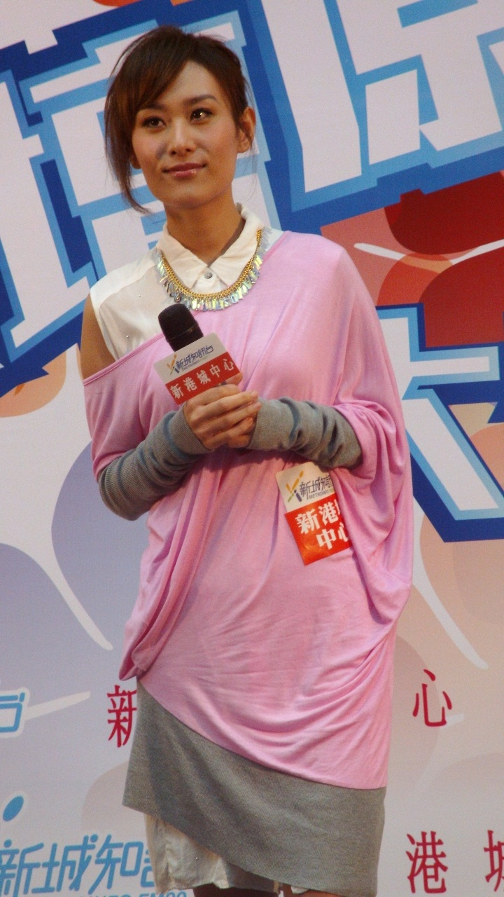 中文（香港）: 梁佑嘉的樣子